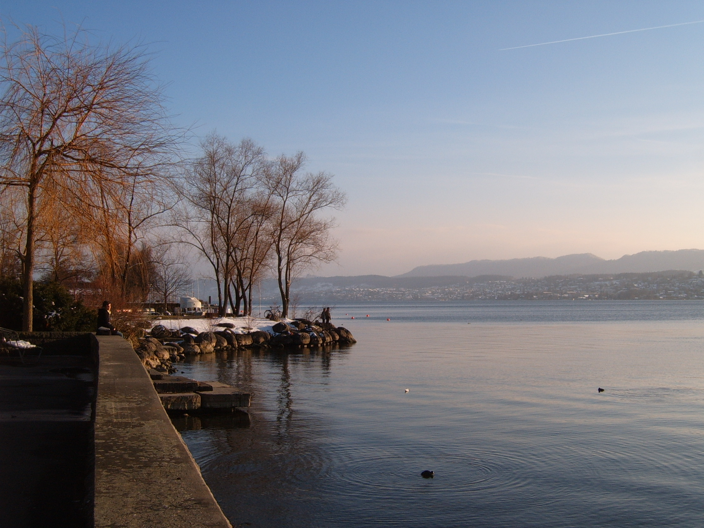 Lake Zurich at Tiefenbrunnen, Zurich, Switzerland Photographer: Markus Bernet Date: 02/27/2006